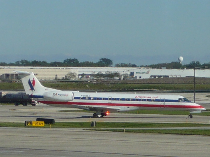 Embraer Regional Jet der American Eagle